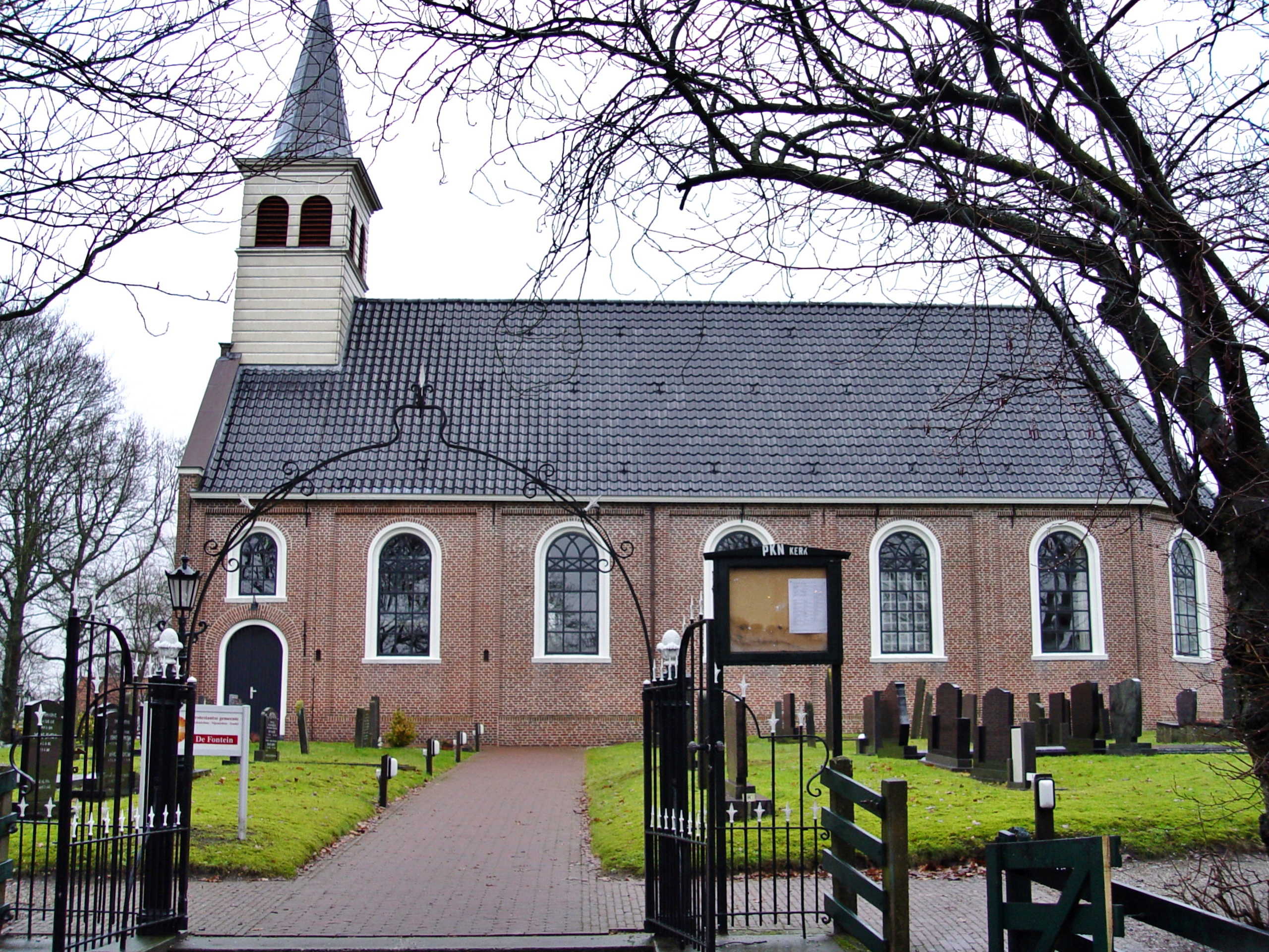 Kerk de Fontein in Oudemirdum